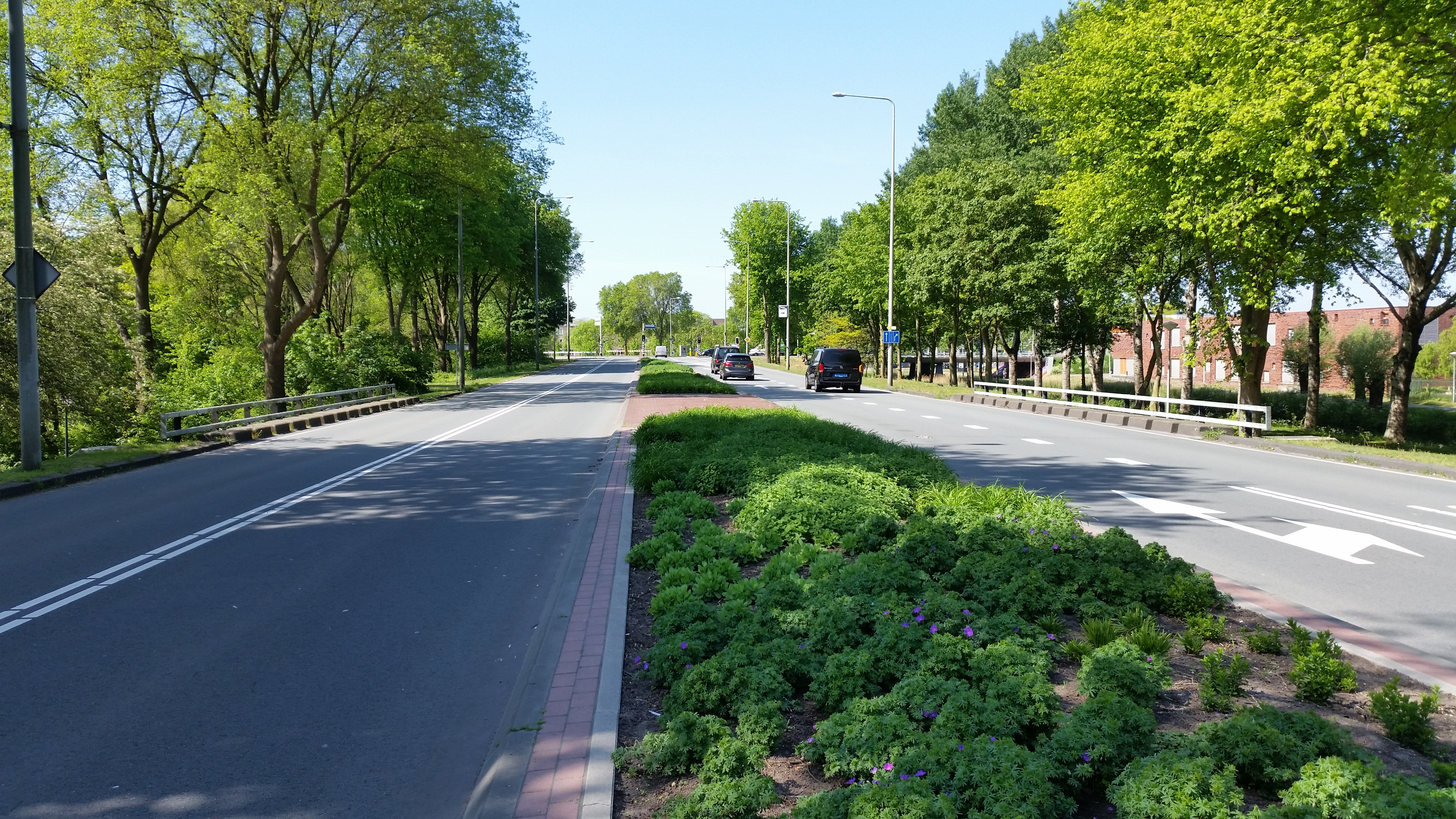 Op, om en onder der Frissensteinbrug (brug 1207) in Amsterdam-Zuidoost.